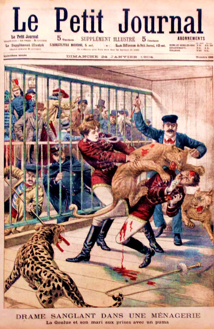 La Goulue et son mari attaqué par un puma